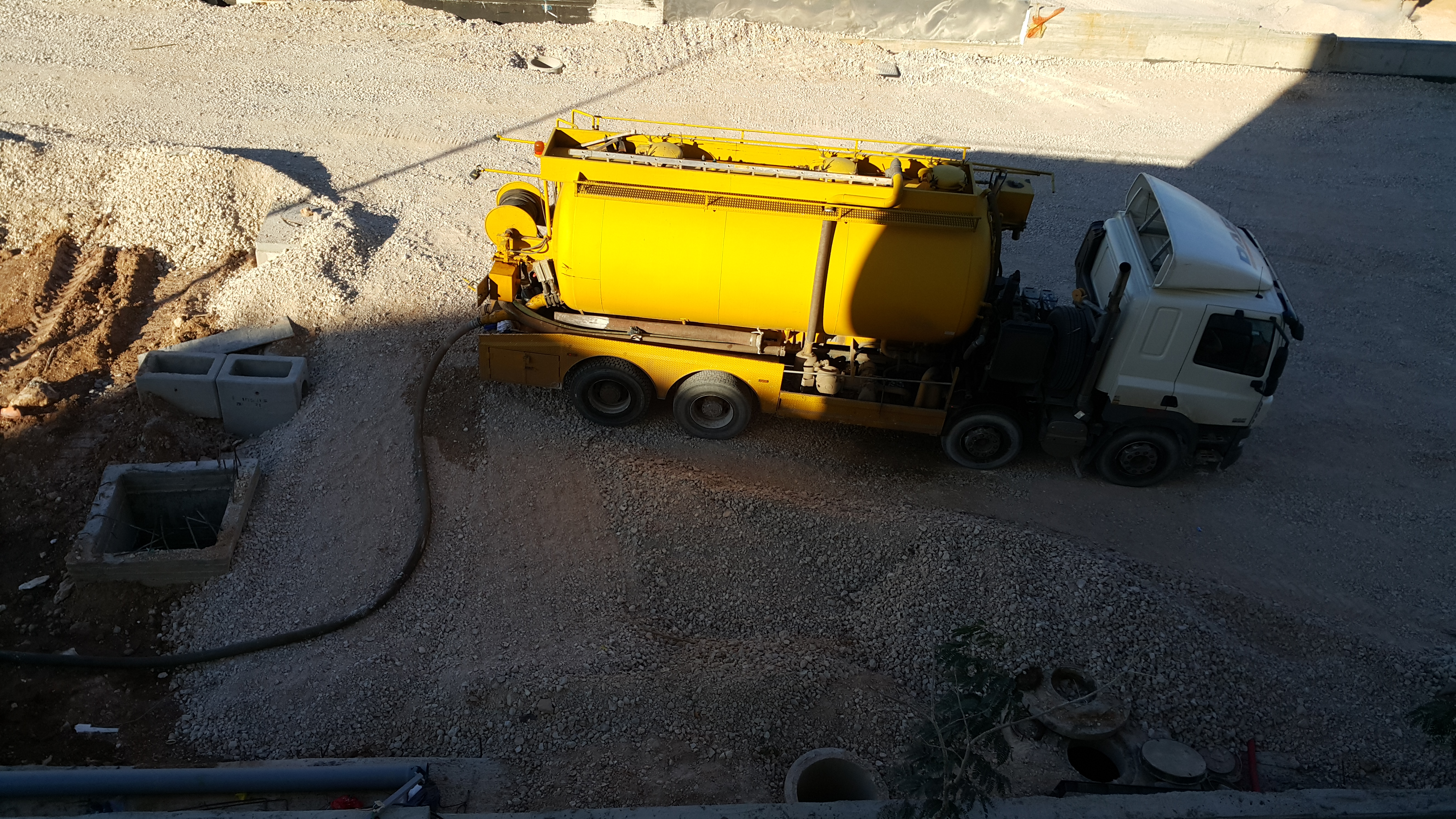 מכלית לשאיבת מי ביוב